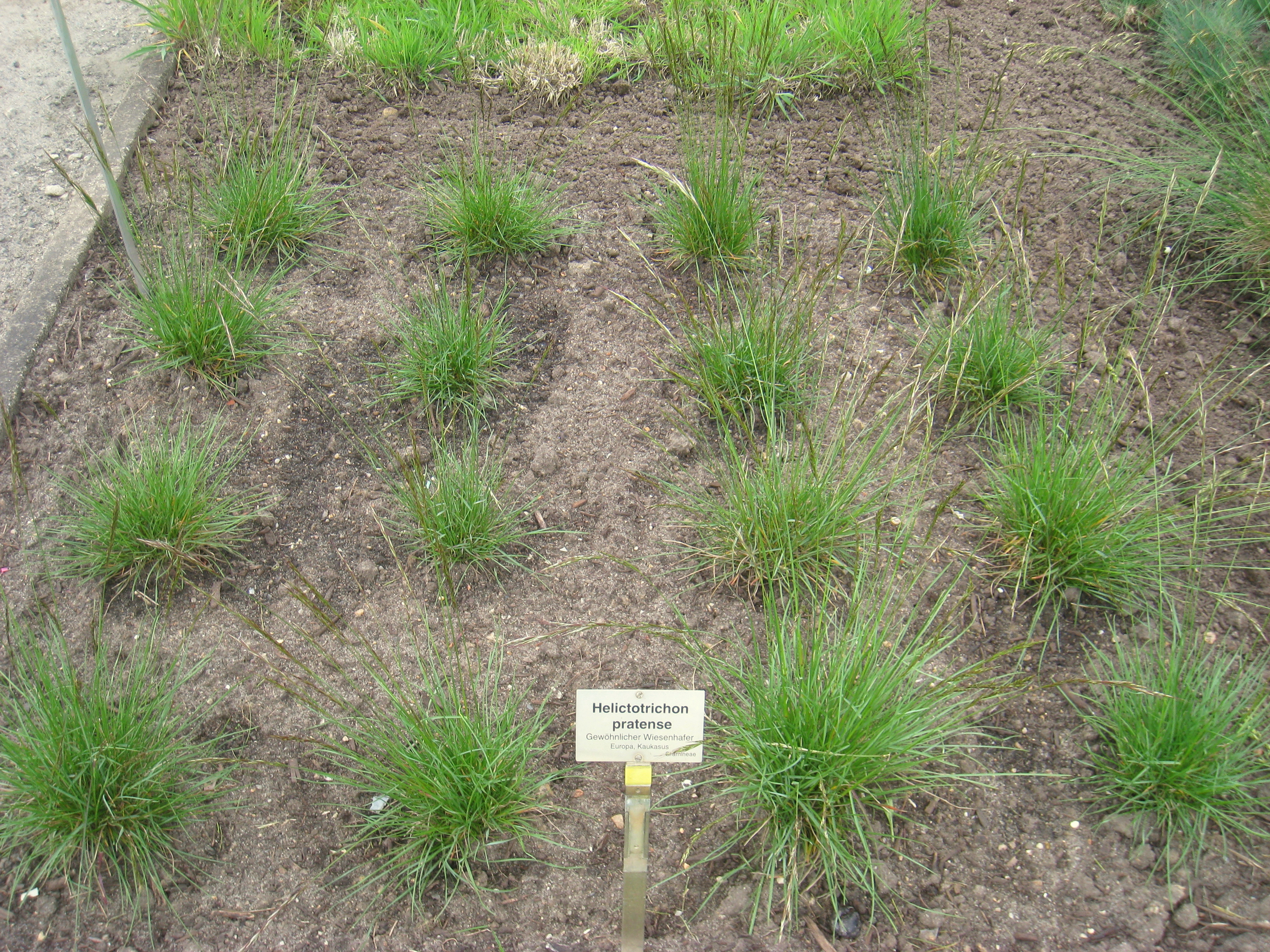 Helictotrichon pratense specimen in the Botanischer Garten, Berlin-Dahlem (Berlin Botanical Garden), Berlin, Germany.